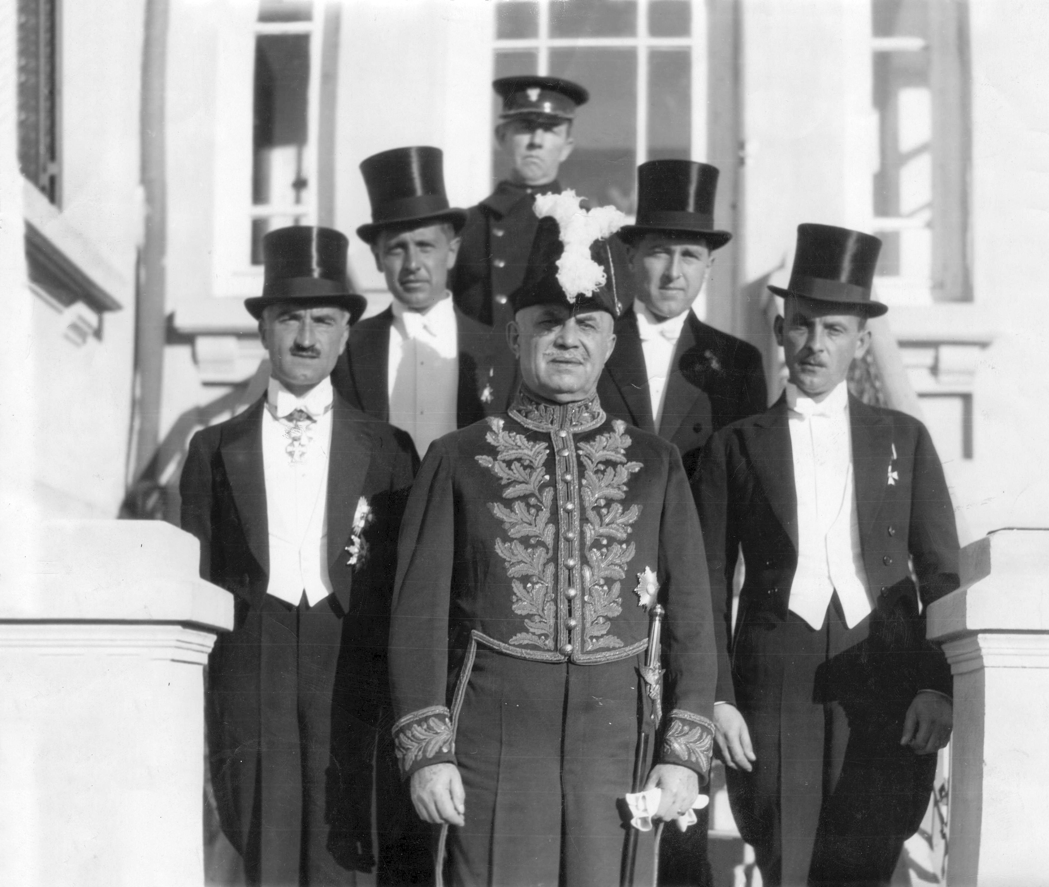 Poseł Polski w Turcji Kazimierz Olszowski (na pierwszym planie w środku) w towarzystwie m.in.: radcy Kazimierza Papee (z lewej) i radcy Zygmunta Vetulaniego (z prawej) przed pałacem prezydenta Turcji Mustafy Kemala w Ankarze po złożeniu listów uwierzytelniających.